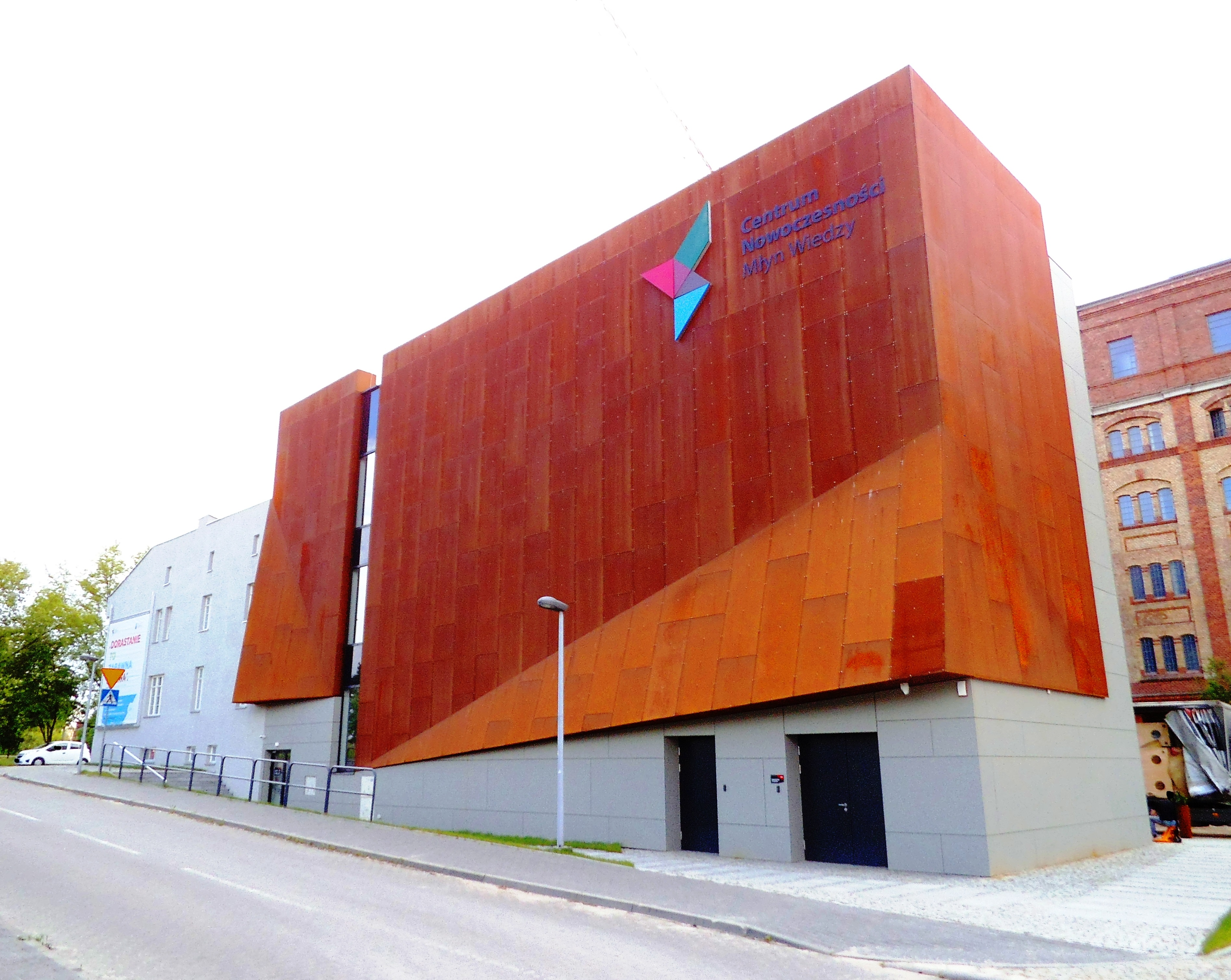 Centrum Innowacyjnej Edukacji w Toruniu